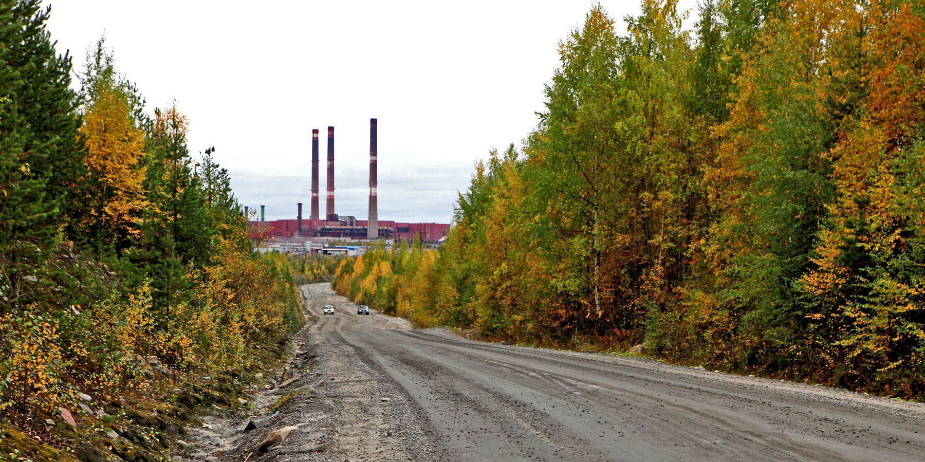 Горно-обогатительный комбинат «Карельский окатыш». Вид с северо-восточной стороны с автодороги А135. Костомукша, Республика Карелия.